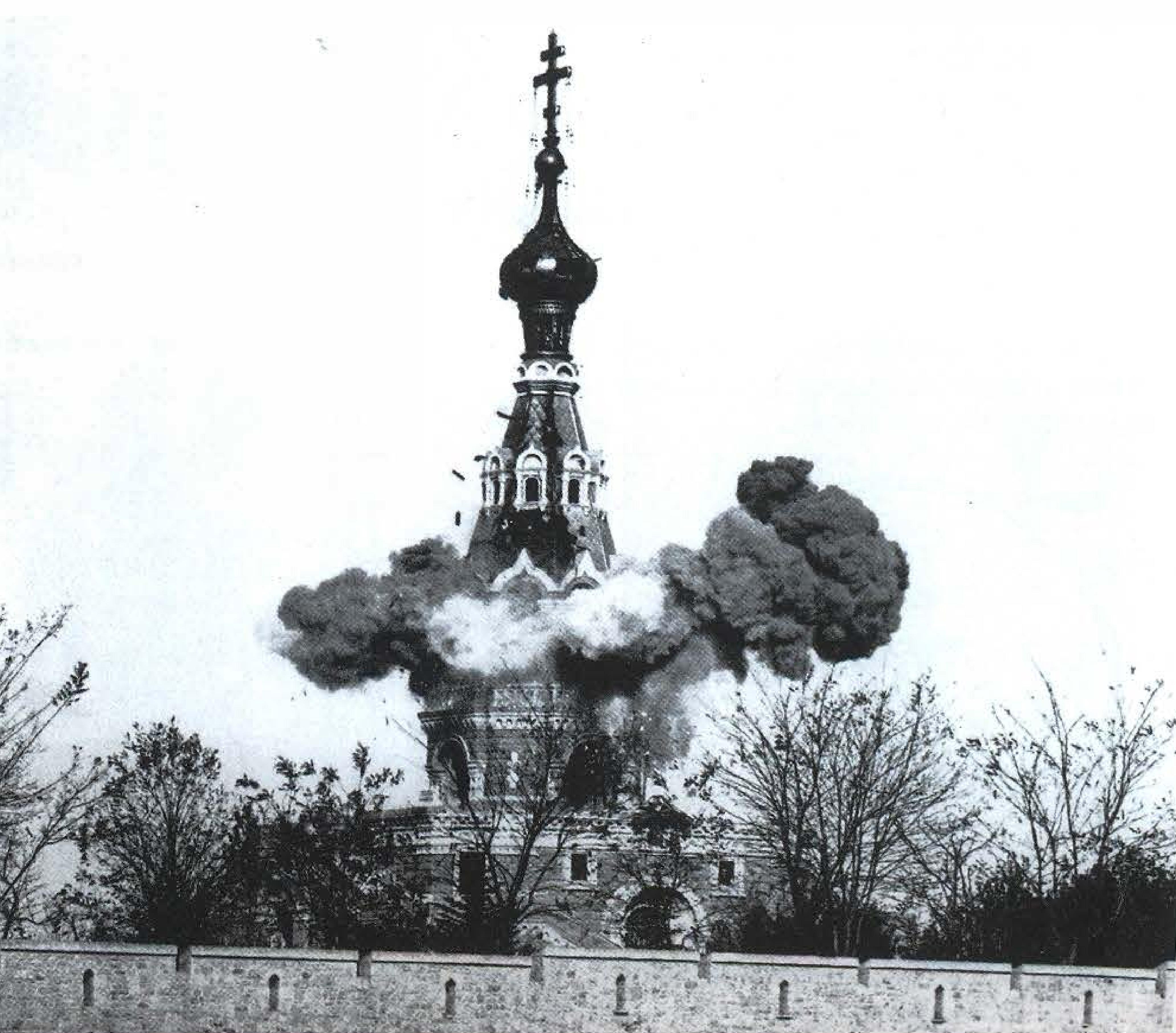 Ayastefanos Rus Abidesi'nin kulesinin patlatılma anında çekilmiş bir fotoğraf.